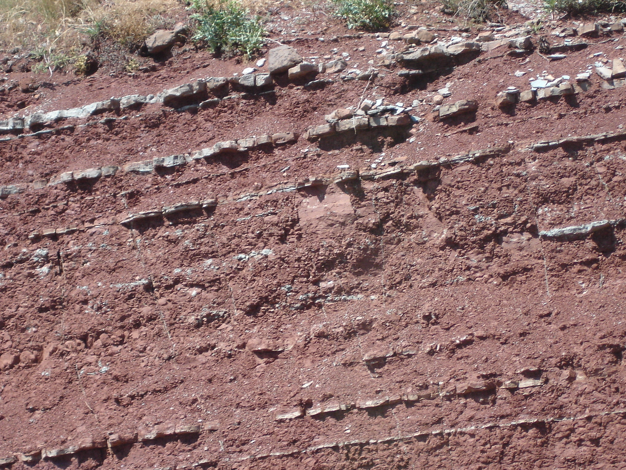 Argilite au Bassin de Lodève en France dans l'Hérault (34), la Lieude, Mérifons. Argile rouge avec du fer oxydé, argile bleu vert avec du fer